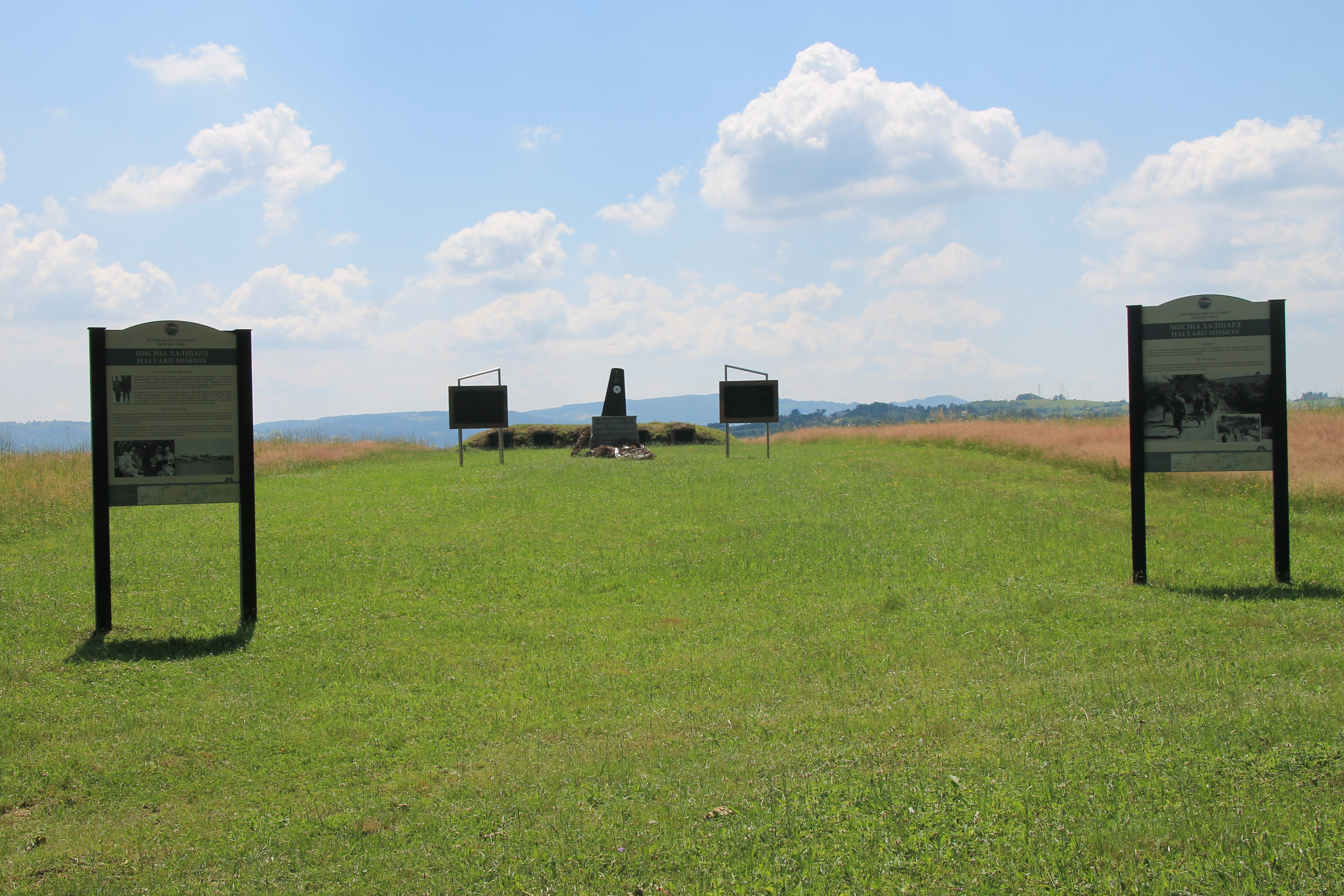 Galovića polje